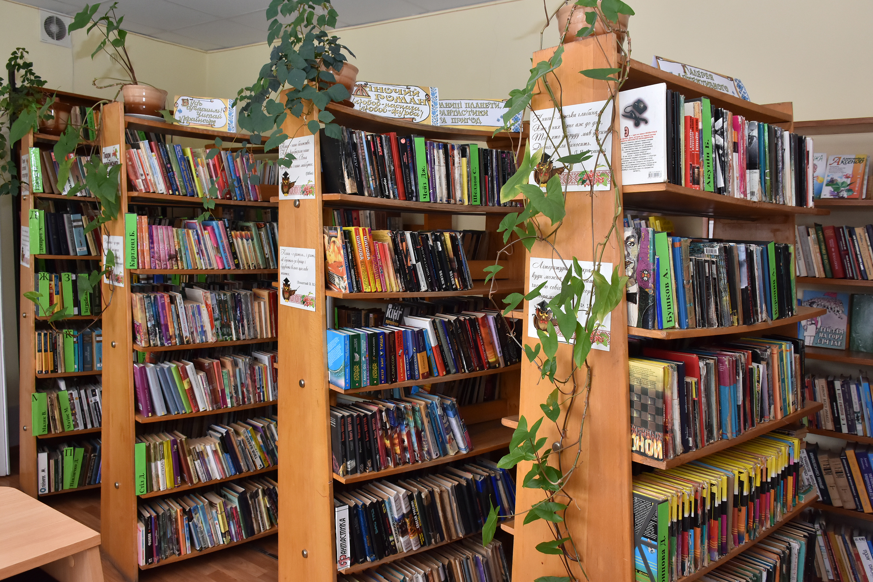 Бібліотека № 5 для дорослих Тернопільської міської централізованої бібліотечної системи.